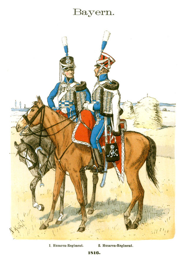 Bayerische Husaren